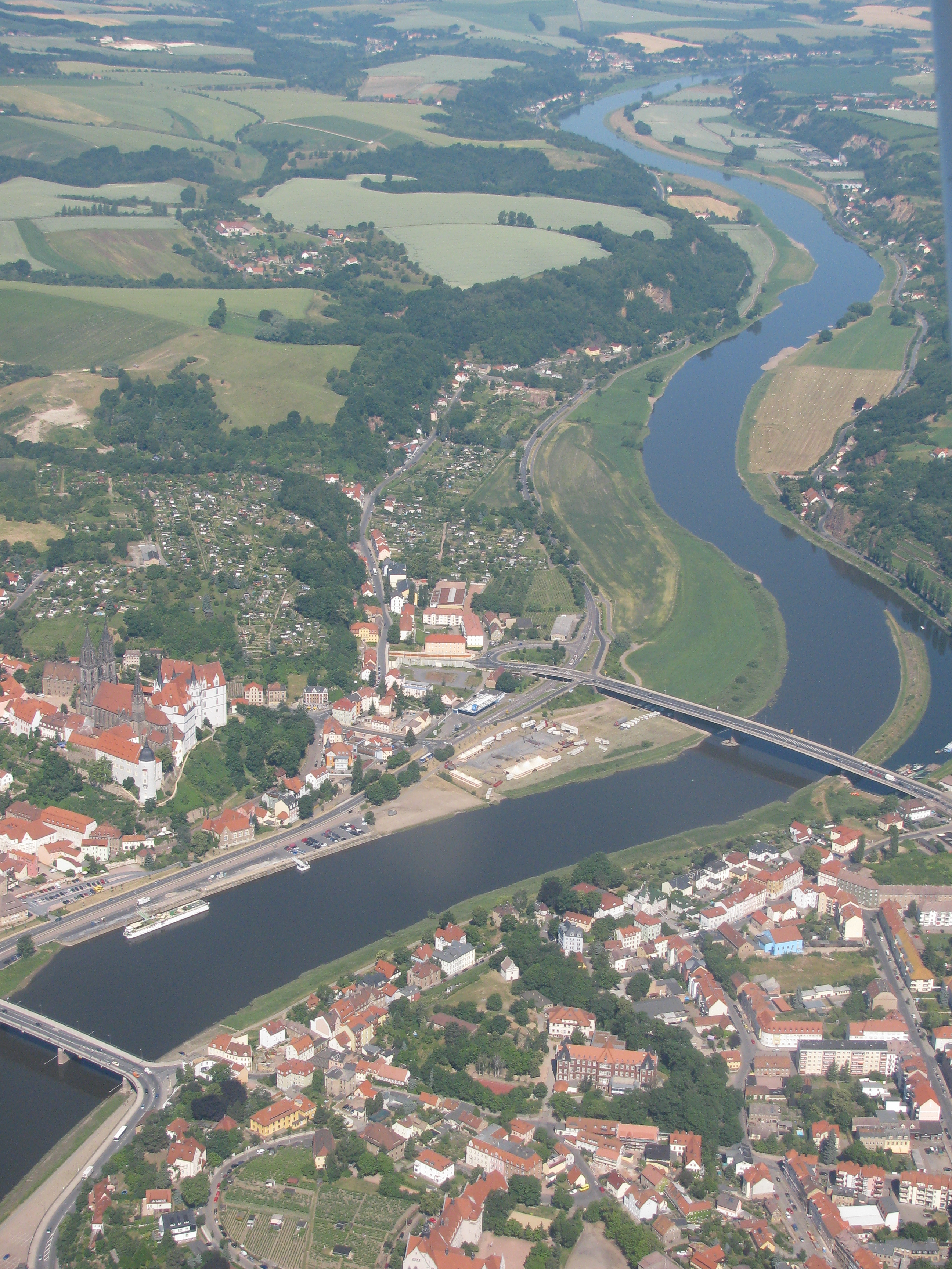 Luftbild Meißen-Vorbrücke und Fischergasse